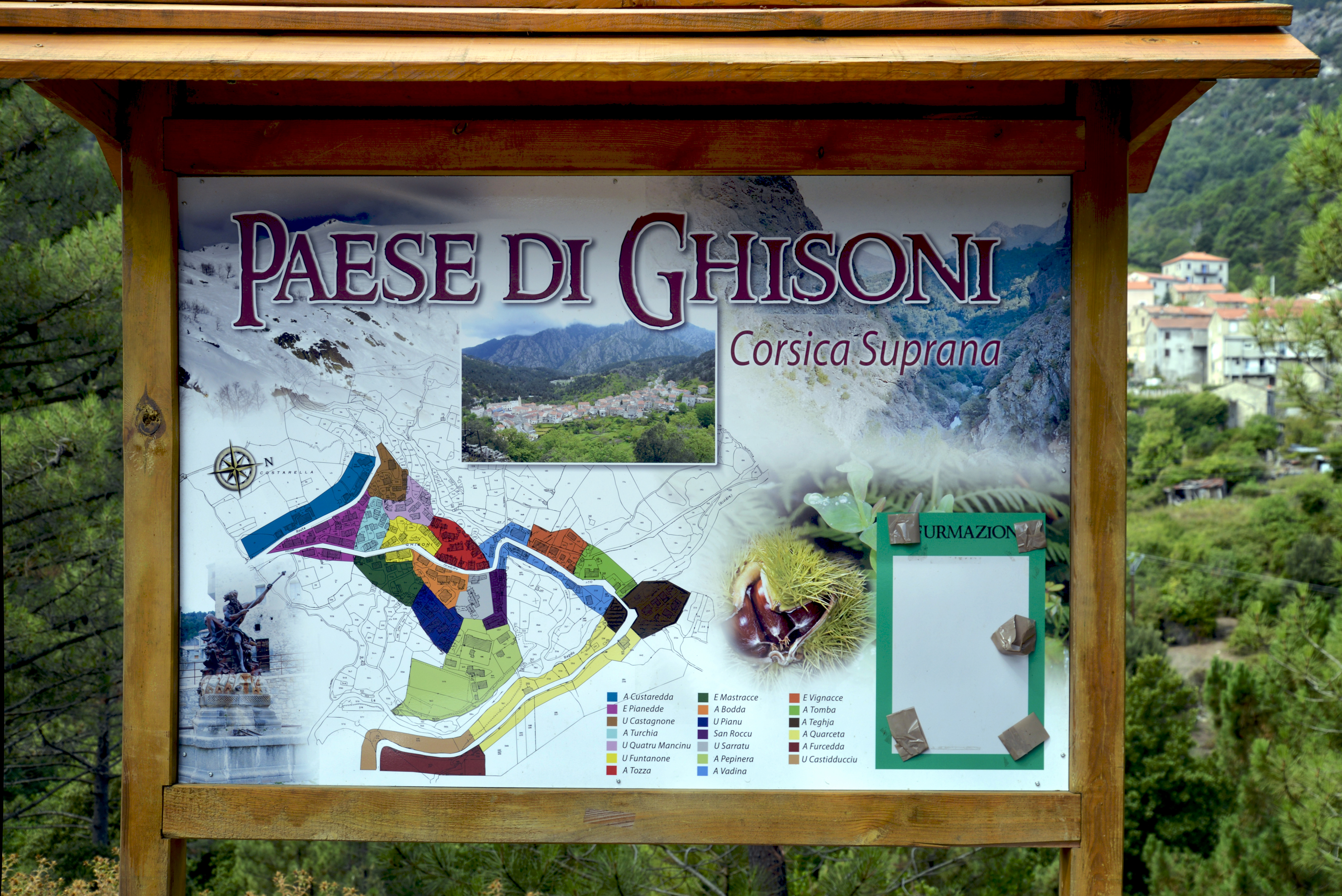 Ghisoni, Fiumorbo (Haute-Corse) - Plan du village avec ses quartiers.